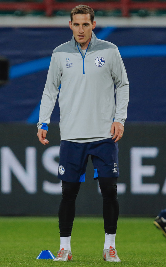 «Шальке» провел тренировку перед матчем с «Локомотивом»